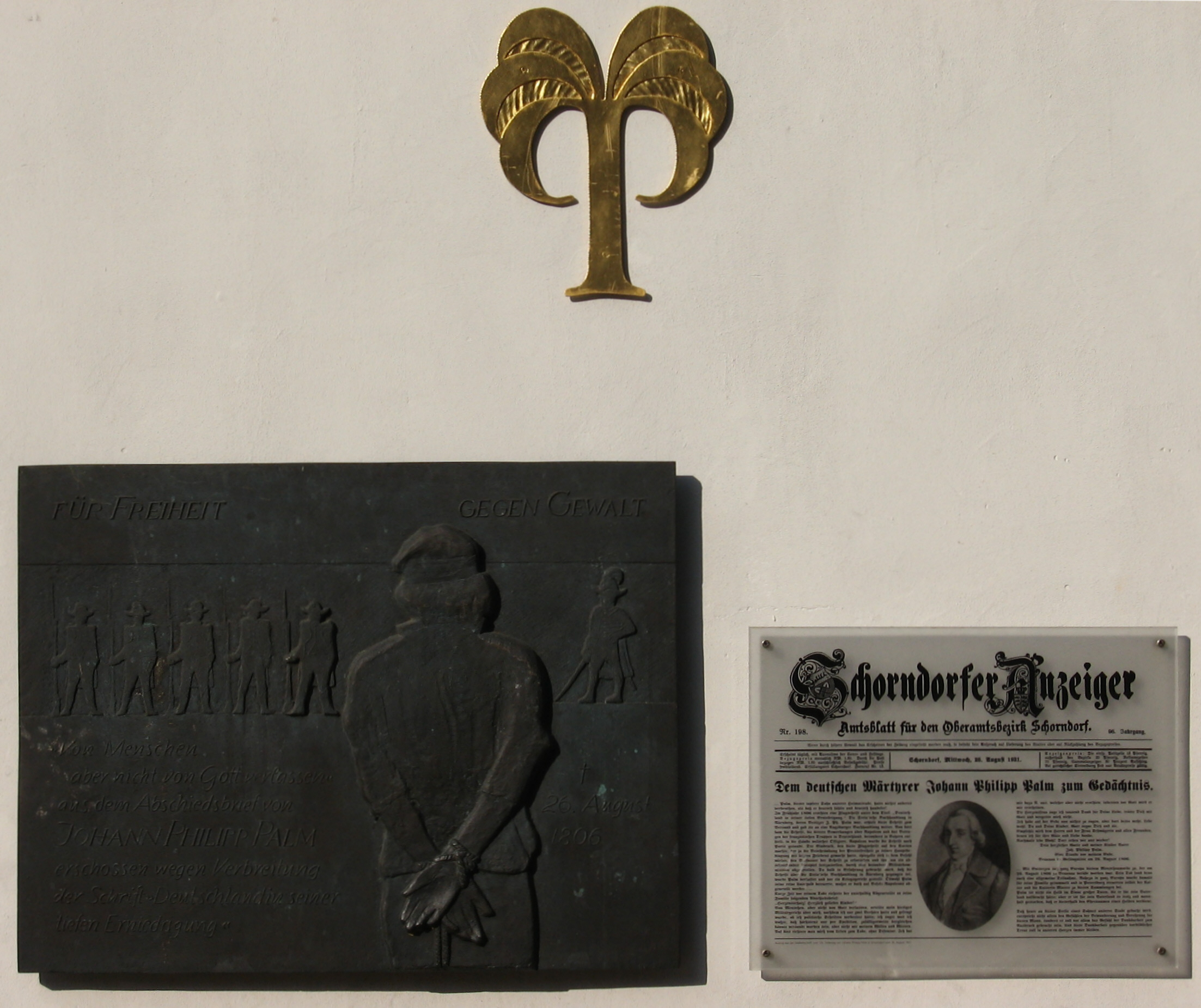 Gedenktafeln Johann Phillip Palm an der Palmschen Apotheke Schorndorf